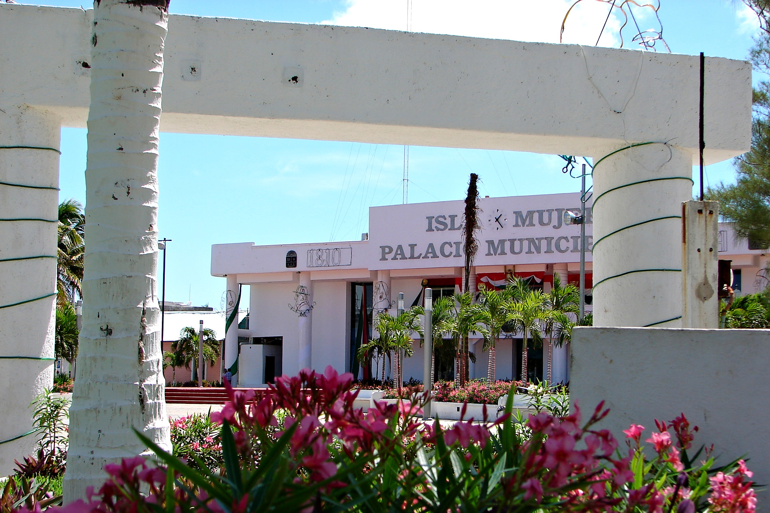 Municipal hall of Isla Mujers, Quintana Roo, Mexico